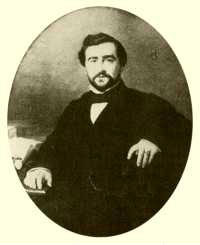 Portrait de Jean Landry, en faible résolution